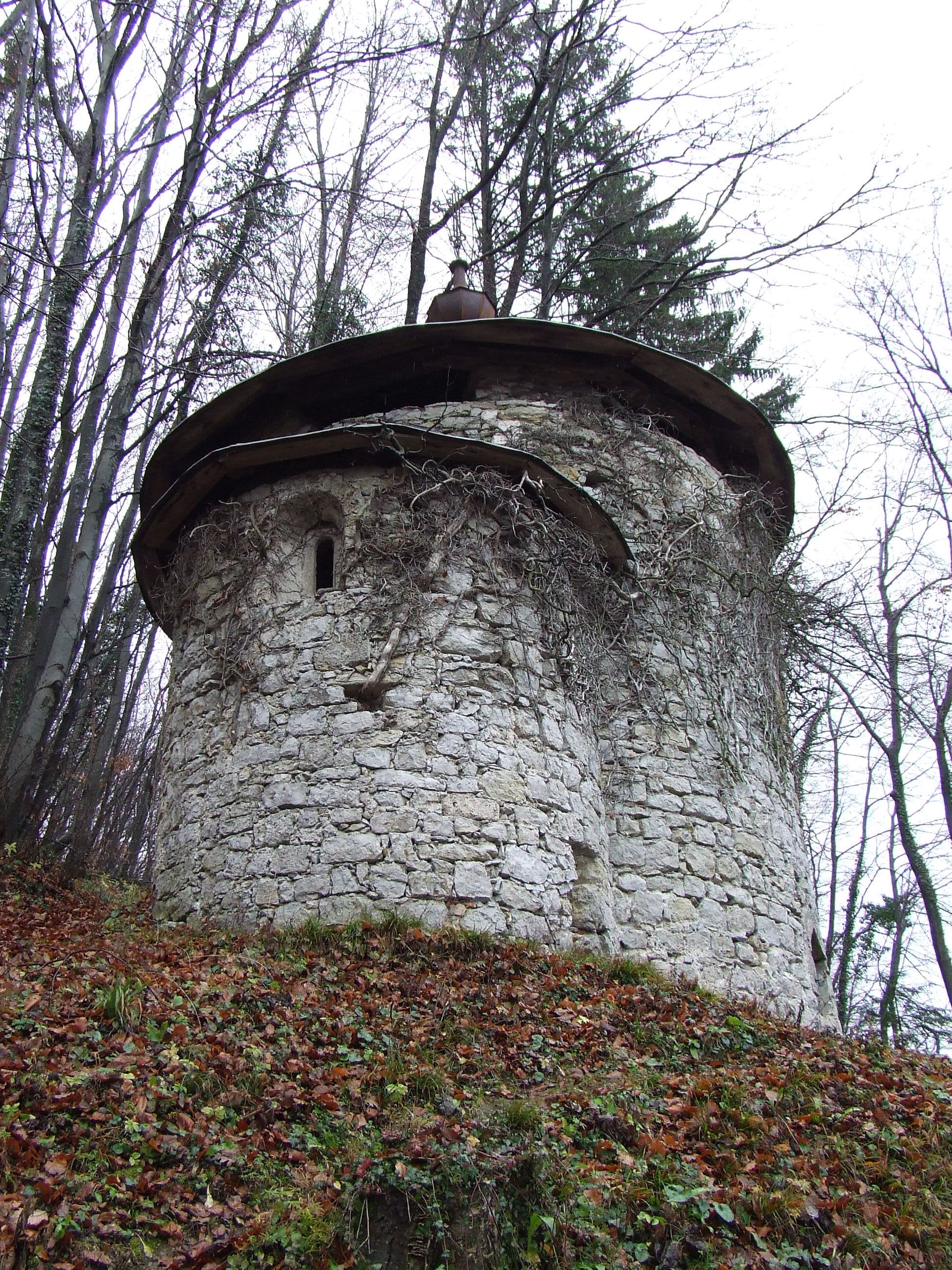 Romanska rotunda Mokronog